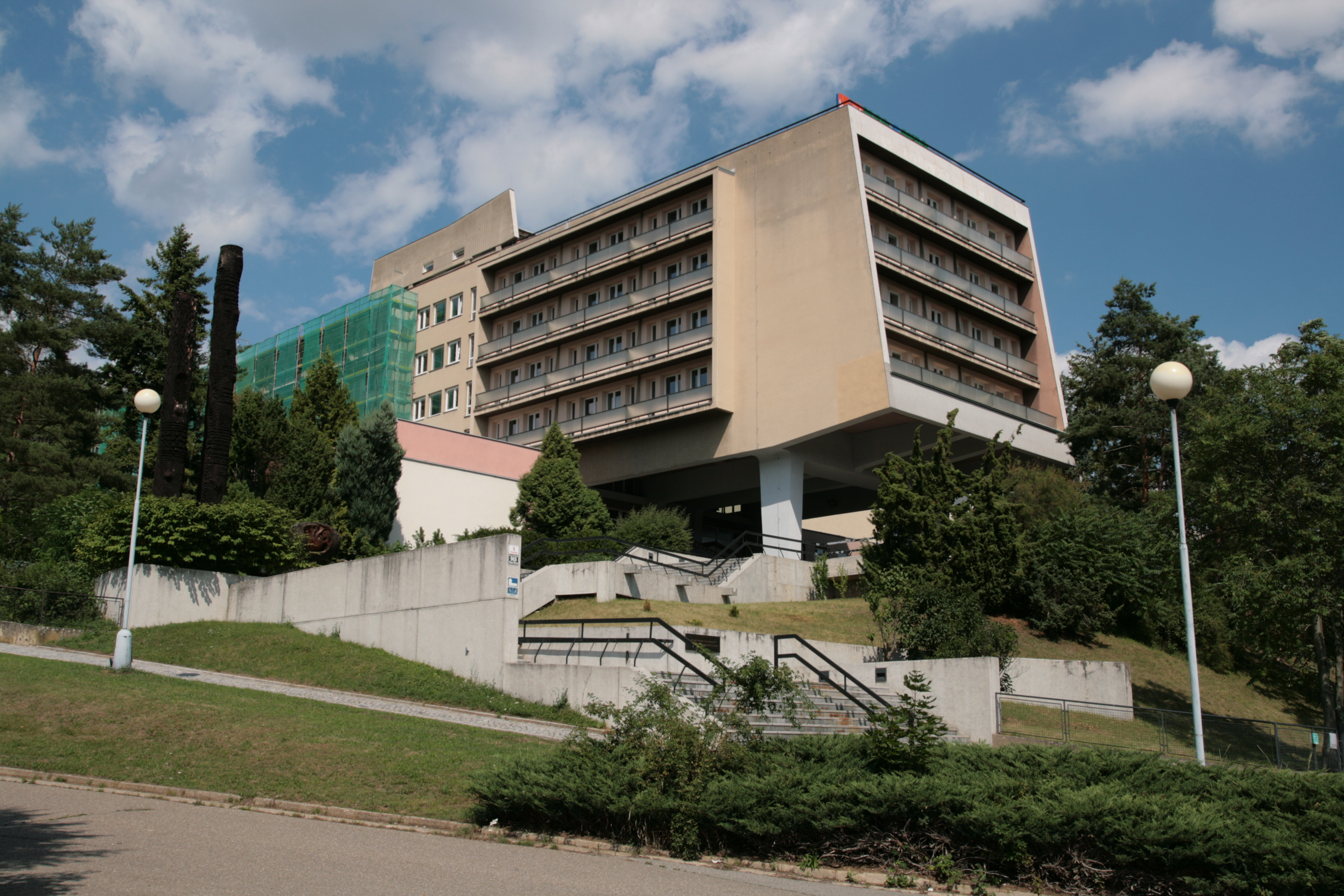 Národní centrum ošetřovatelství a nelékařských zdravotnických oborů, Vinařská 965/6, Staré Brno, Brno-střed.